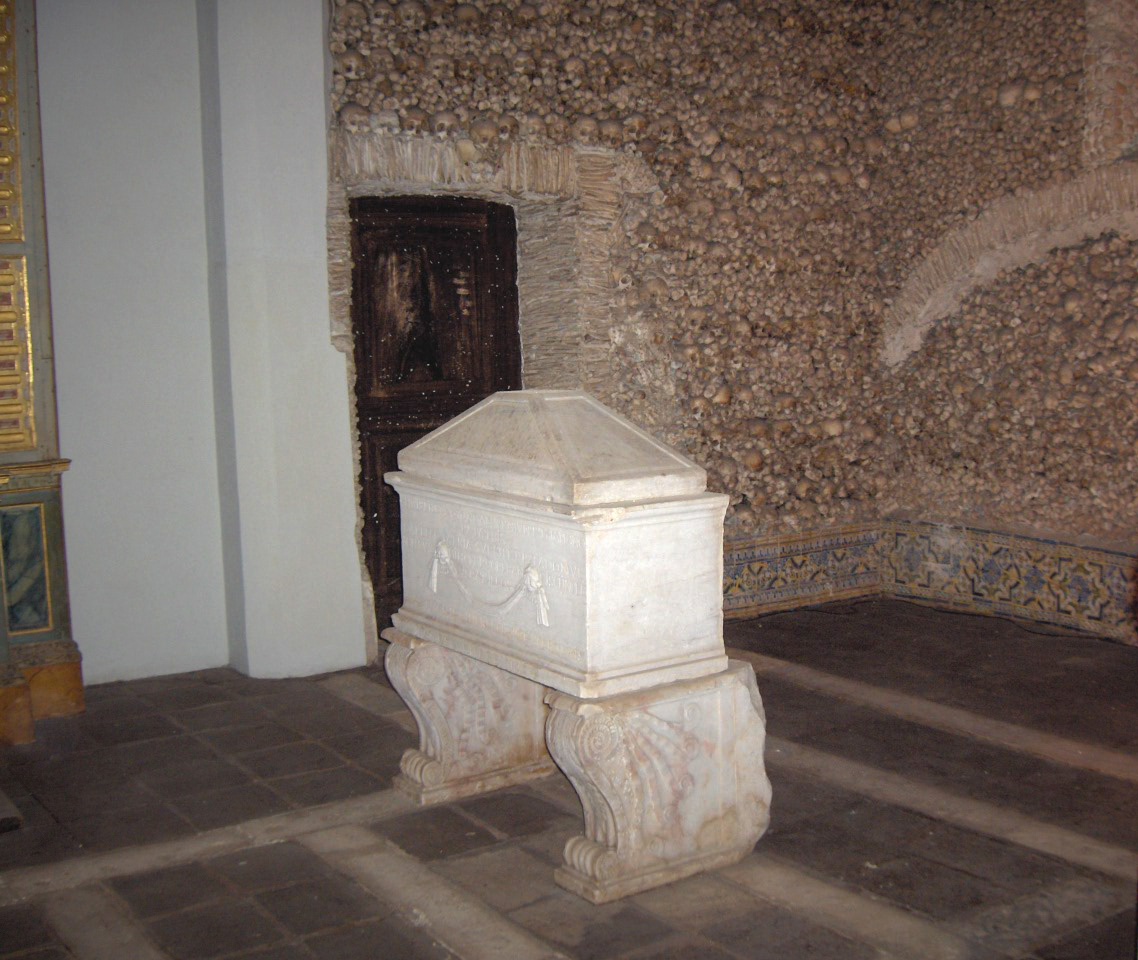 Ossuary; Chapel of Bones; Igreja de São Francisco, Évora, Portugal